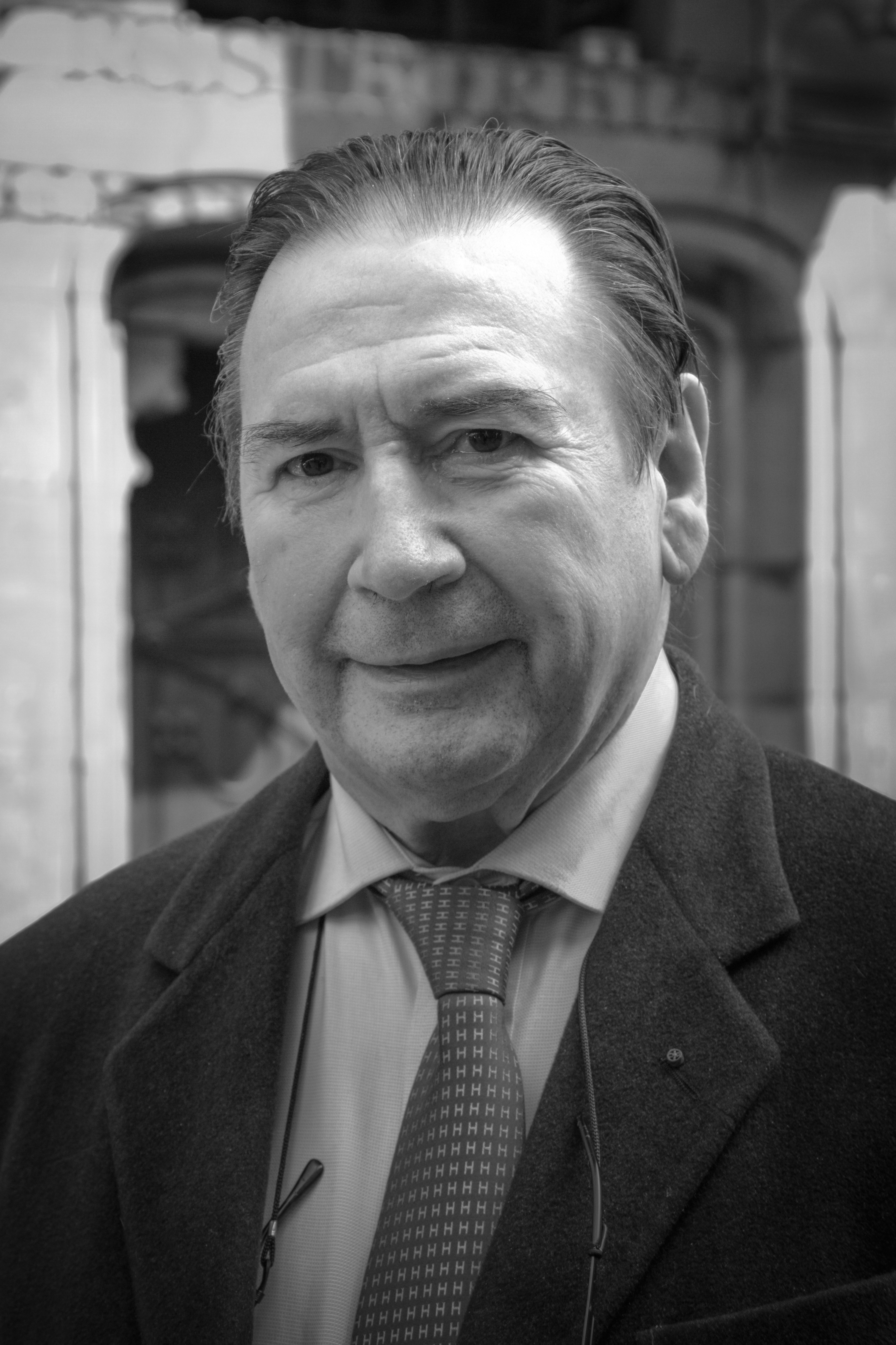 Guy-Pierre Baumann est né en 1940 à Magstatt-le-Bas est un cuisinier et restaurateur français.